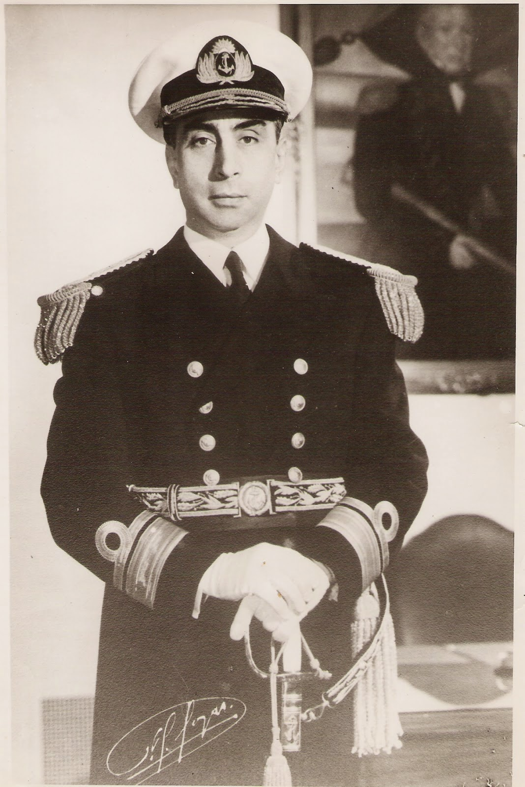 Retrato oficial y autografiado del vicepresidente Isaac Francisco del Ángel Rojas, tomado en 1955.